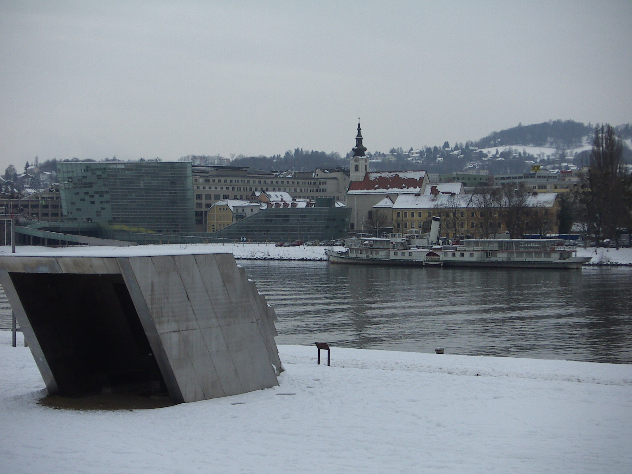 Plastik von Helmuth Gsöllpointner, EVOLUTION, 1978; am anderen Ufer: Ars Electronica Center